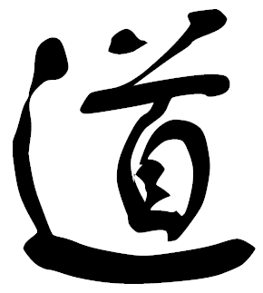 道 dào « la Voie », calligraphié en style 行書 xingshu « écriture cursive »